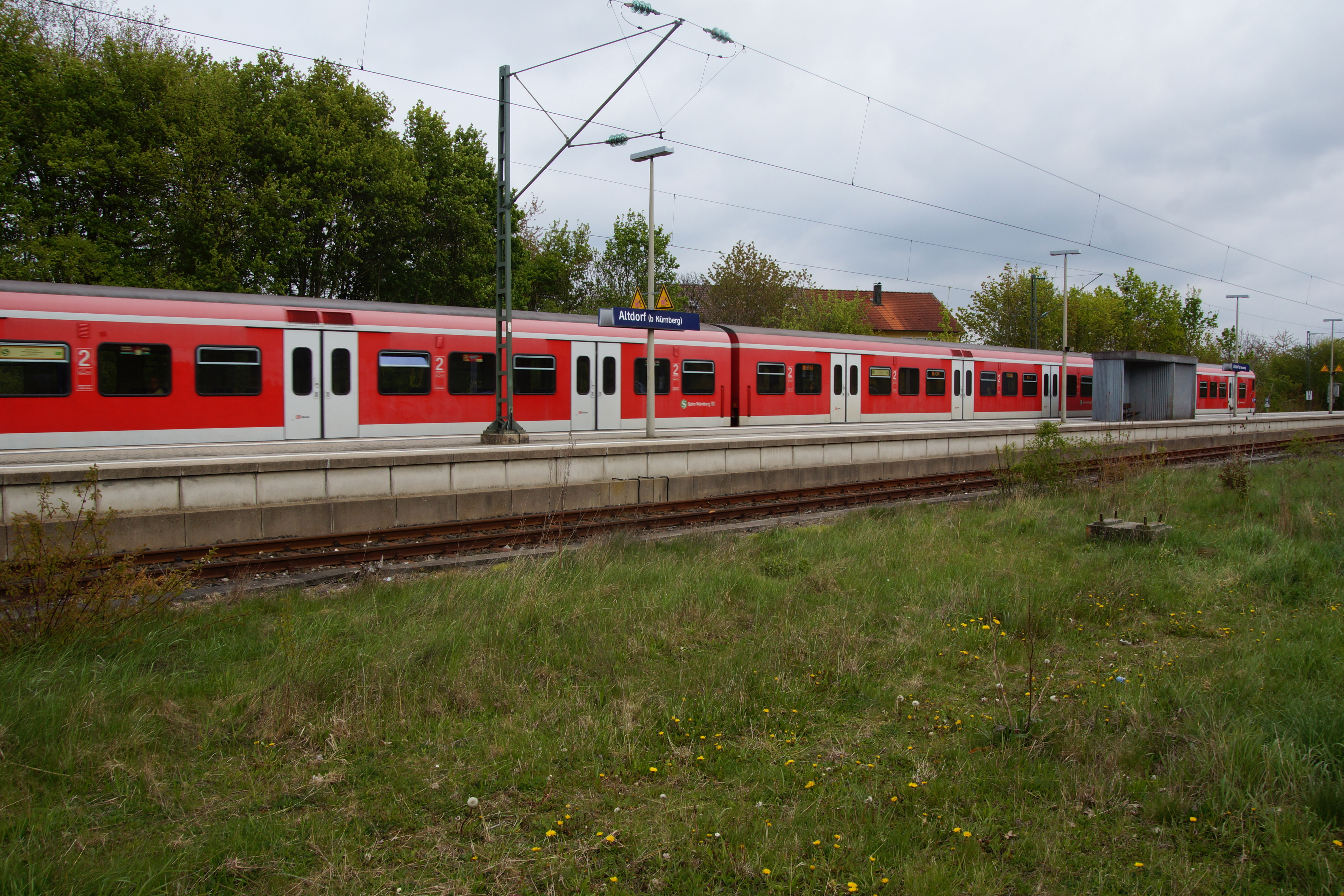 Der Bahnhof von Altdorf bei Nürnberg